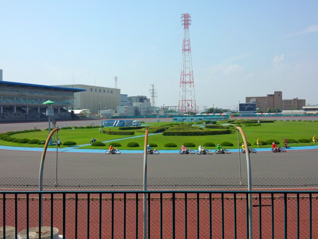 船橋オートレース場全景